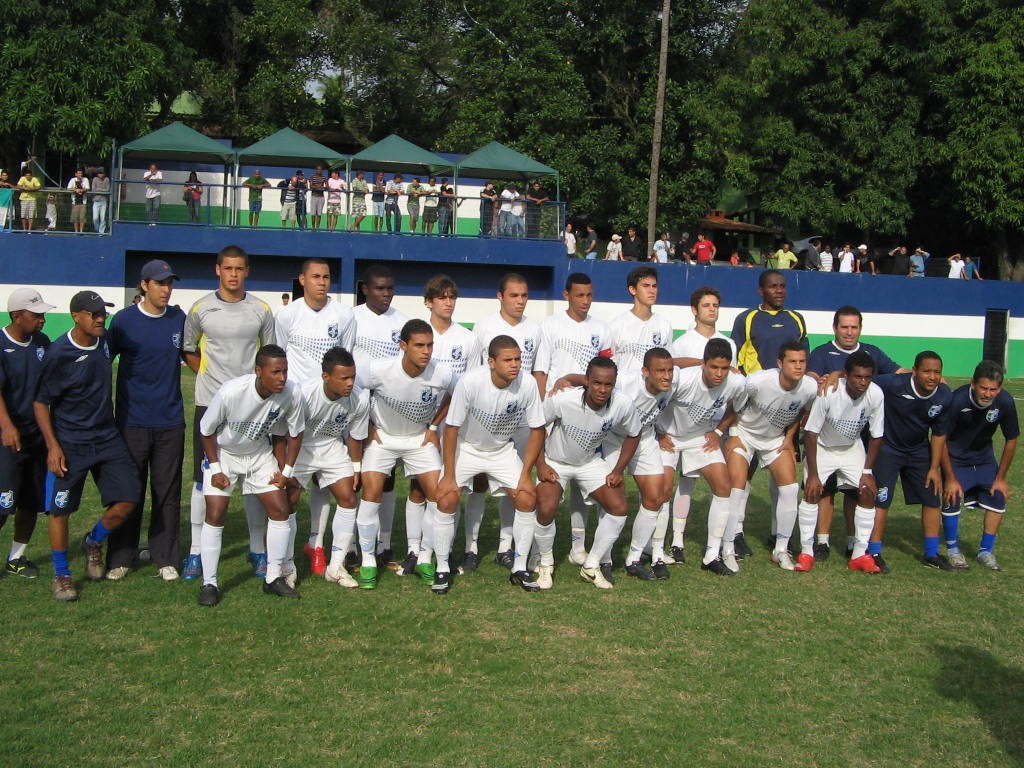 Equipe de Juniores do Artsul FC, vice-campeã Estadual da Série B de Juniores. Foto de Paulo Roberto Rodrigues.